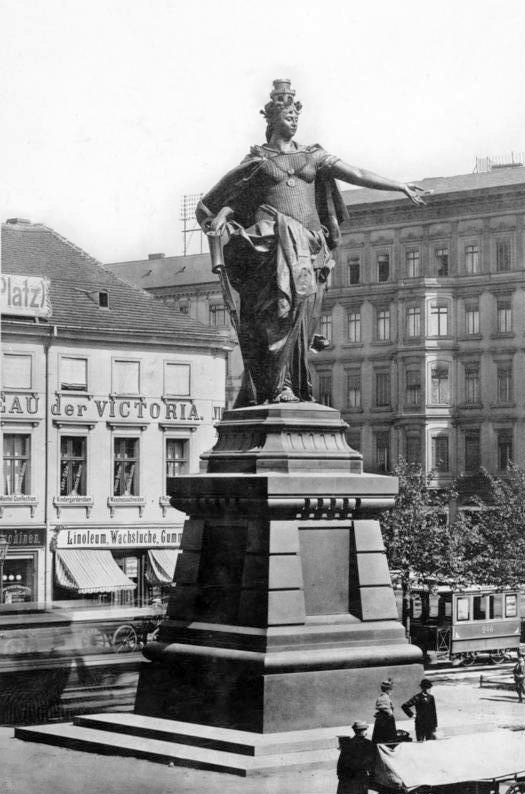 Berlin, "Berolina" am Alexanderplatz ADN-ZB-Archiv Berlin; Alexanderplatz um 1900 UBz.: Die "Berolina" von dem Bildhauer Emil Hundrieser auf dem Alexanderplatz.